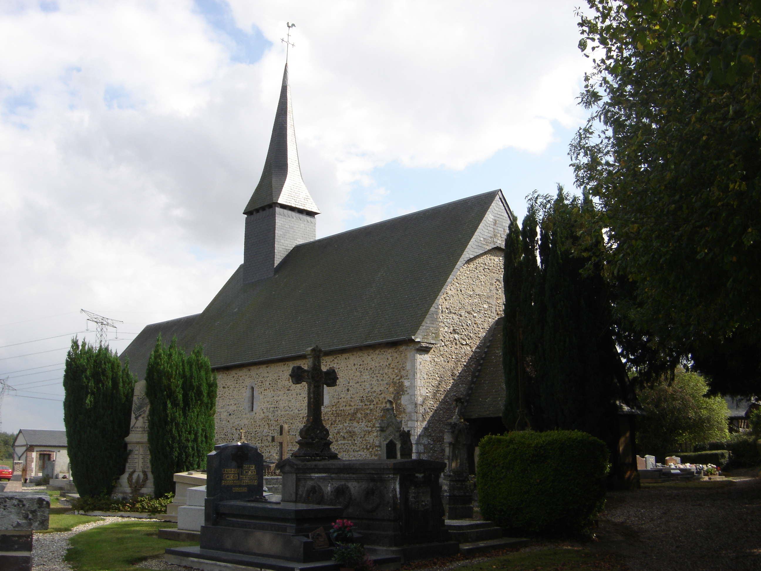 Eglise de La Noë-Poulain (Eure, Normandie, France)